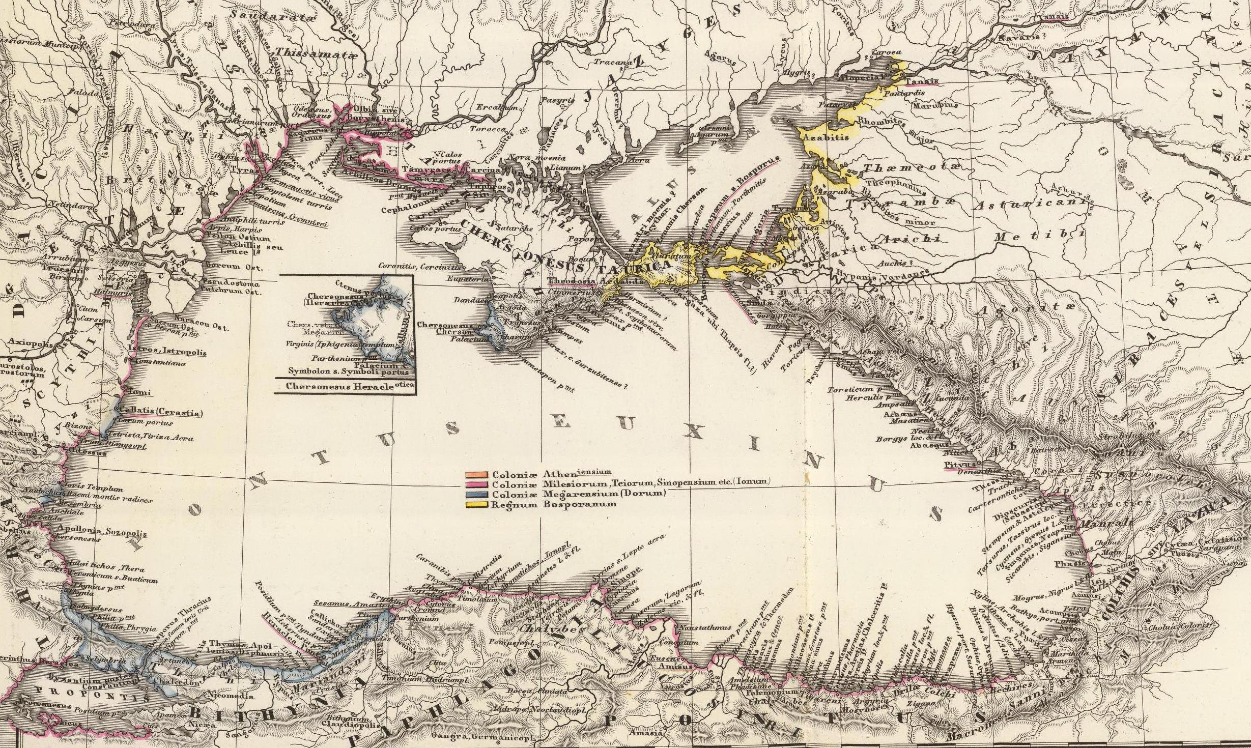 Pontus Euxinus et quae ei adjacent. (with) Bosporus Thracius. (with) Bosporus Cimmerius. (with) Chersonesus Heracle. Corr. Menke 1861. Gothae: Justhus Perthes. Spruner-Menke atlas antiquus. (1865)